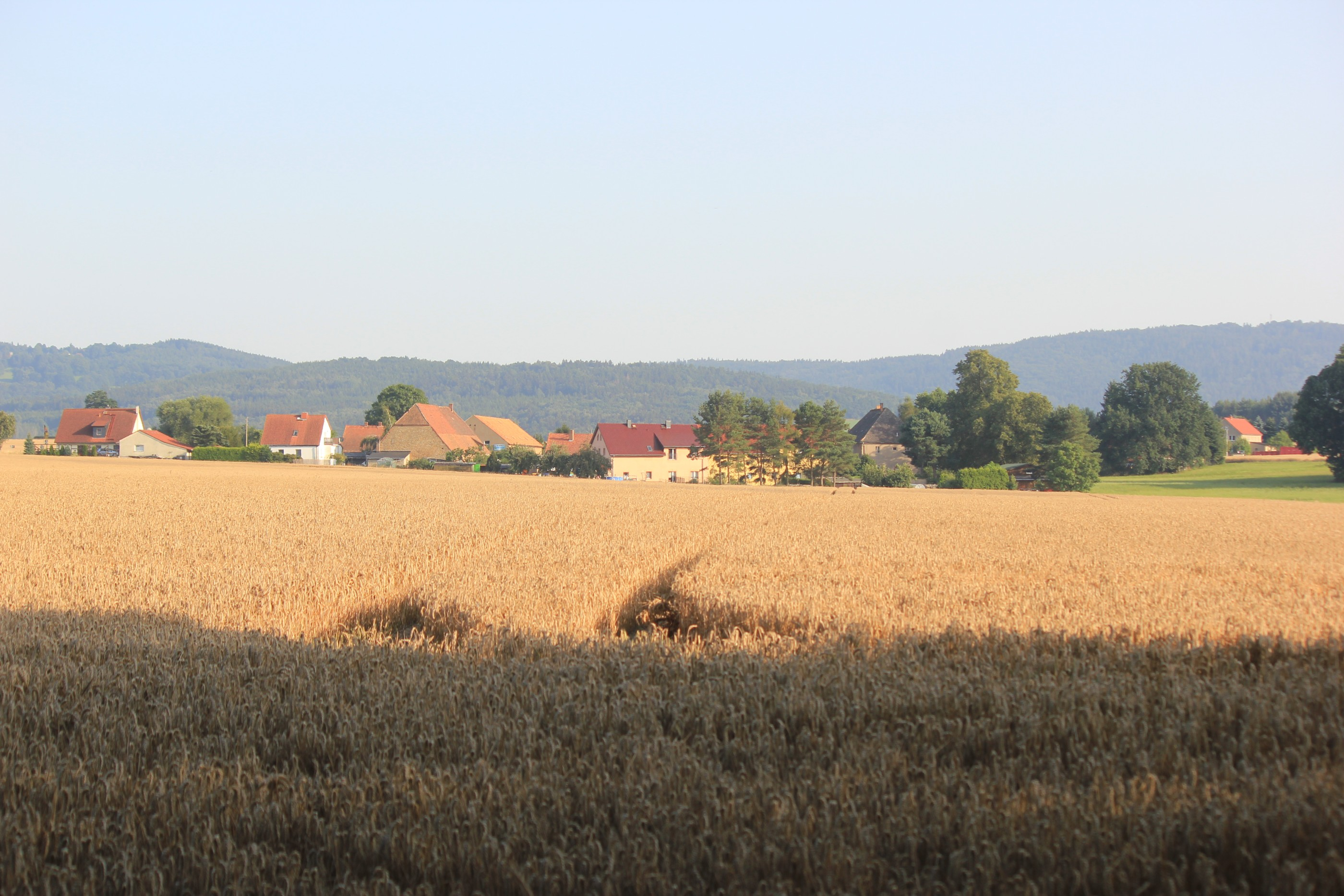 Hornjoserbsce: Napohlad Družkec ze sewjera.